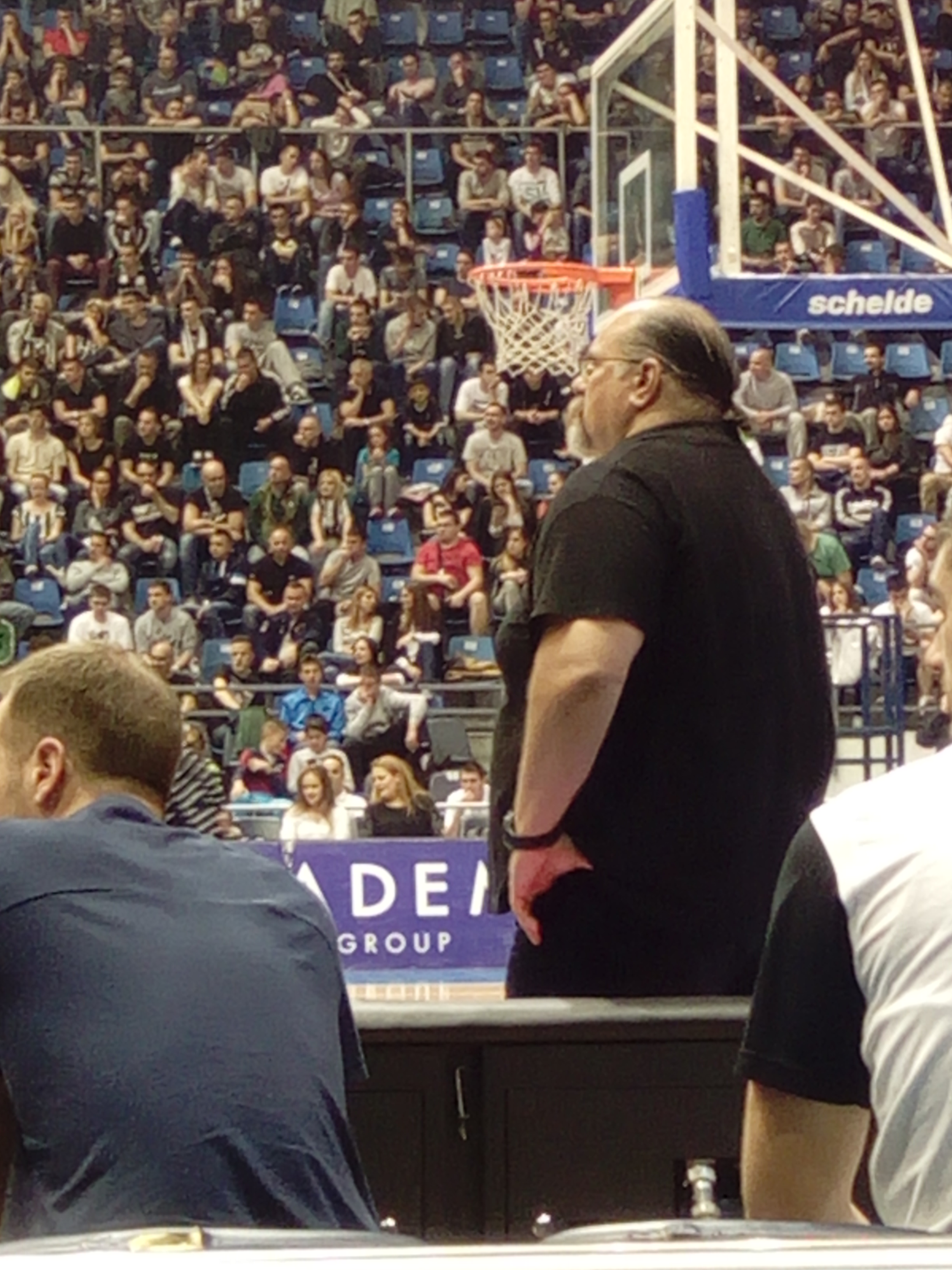 Srpski (latinica): Aleksandar Džikić kao trener Partizana na meču protiv Konstantina 14.5. 2016.